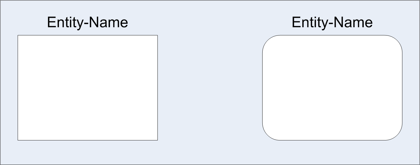 Entity-Darstellung im IDEF1X Standard 16:44, 30. Mär 2005 . . Frank Roeing (24323 Byte) (selbst erstellt, GNU-FDL)